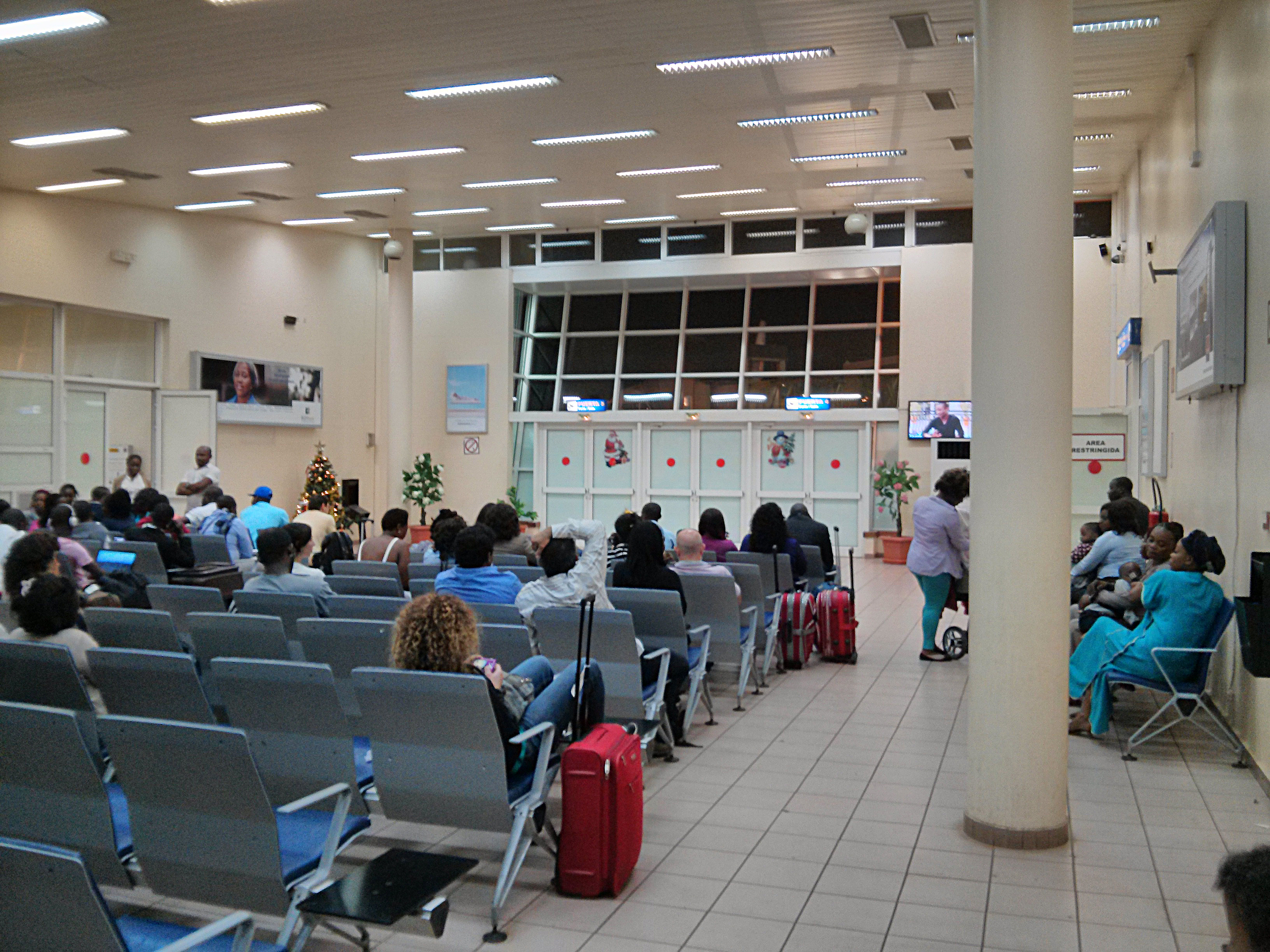 Wartehalle des Aeropuerto Malabo, Gates 3, 4, 5